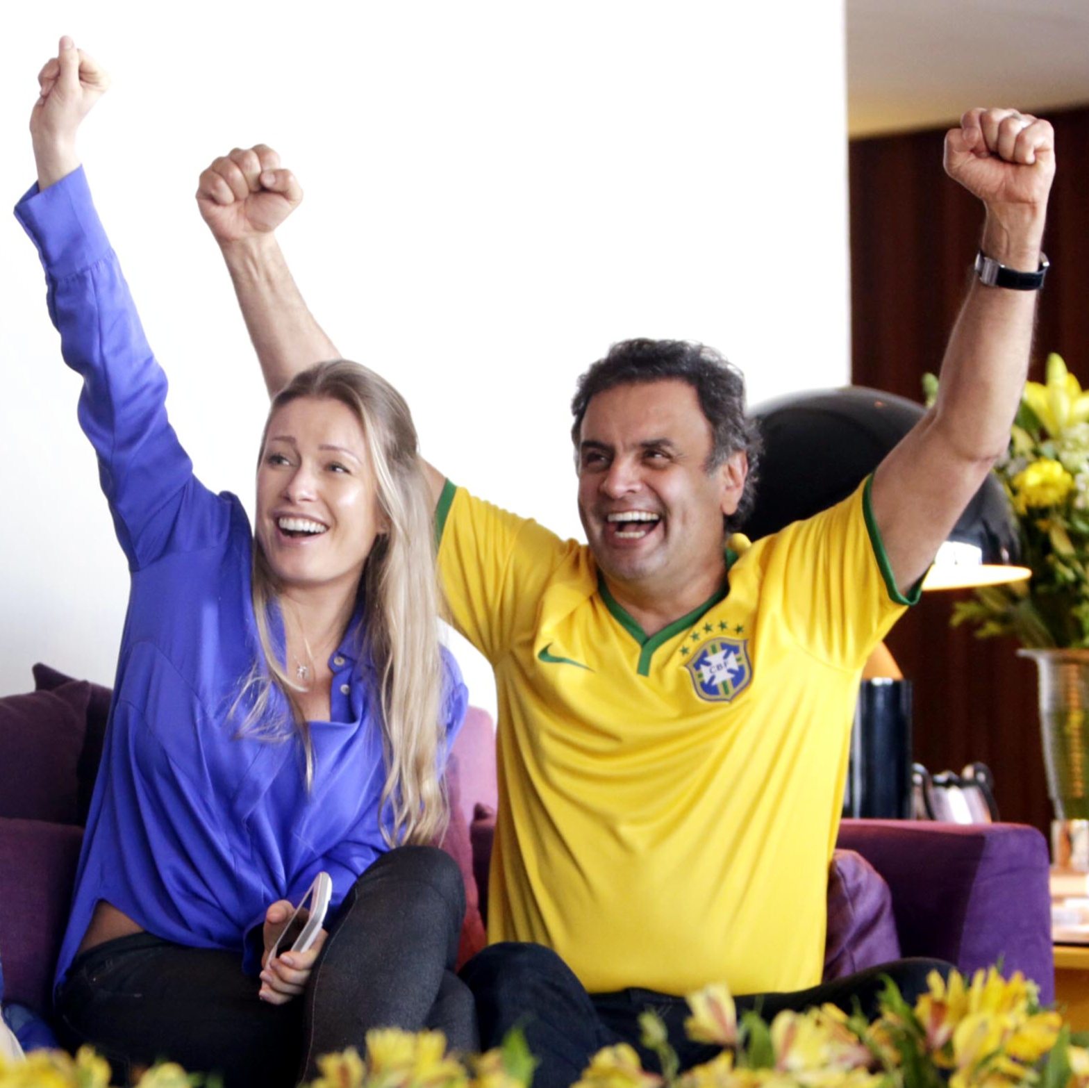 Aécio Neves - Copa do Mundo - 04/07/2014 O candidato do PSDB à Presidência da República, Aécio Neves, e sua esposa, Letícia Weber, comemorando o gol de Thiago Silva no jogo Brasil x Colômbia, nesta sexta-feira (04/07).